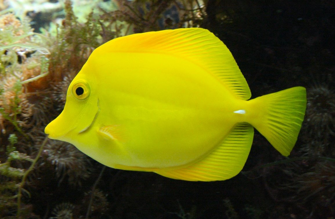 Poisson Chirurgien jaune